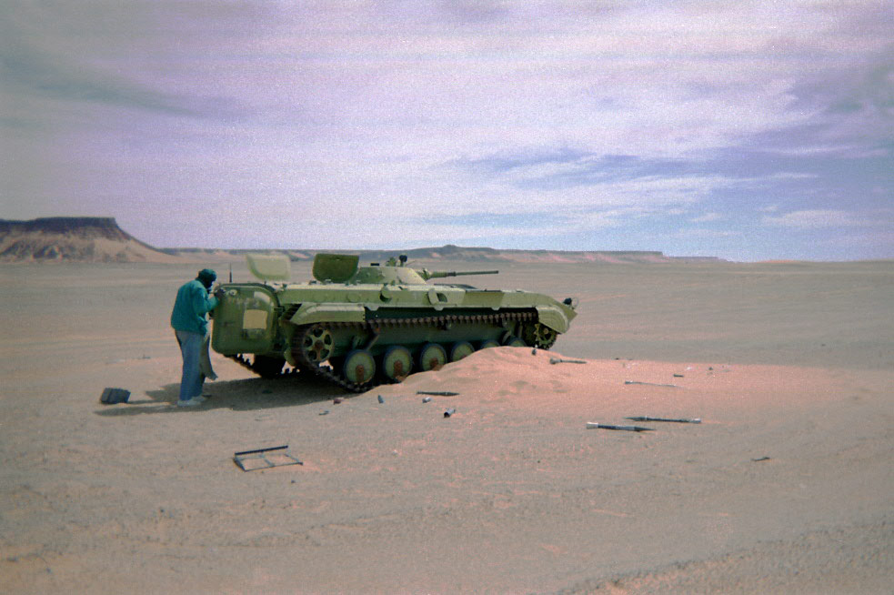 Carcasse de char libyen dans le désert tchadien. Photo prise en 1998 entre Gouro et Ounianga Kébir